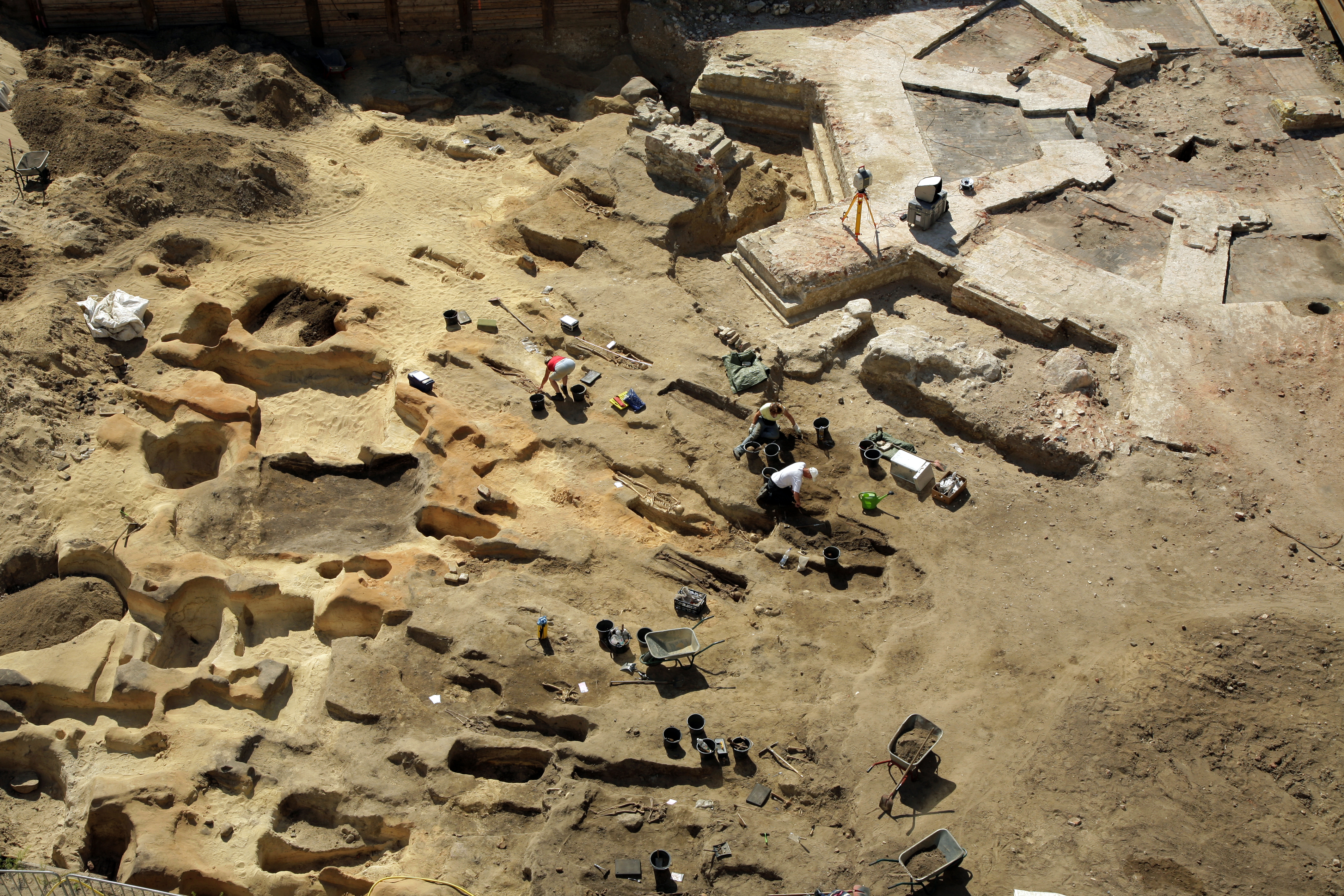 Berlin-Mitte, Petriplatz. Fundamente der Petri-Kirche und Freilegung von Gräbern während der Ausgrabungen